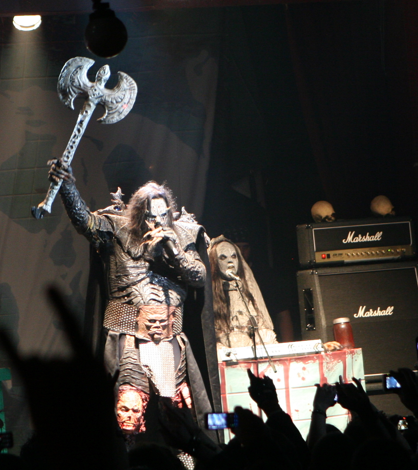 Lordi en la Sala Apolo de Barcelona el 20 de Febrero de 2009